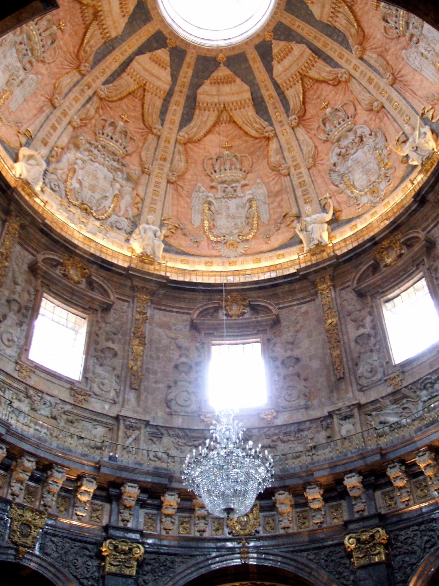 Santuario de San Ignacio de Loyola, en Azpeitia (Gipuzkoa)